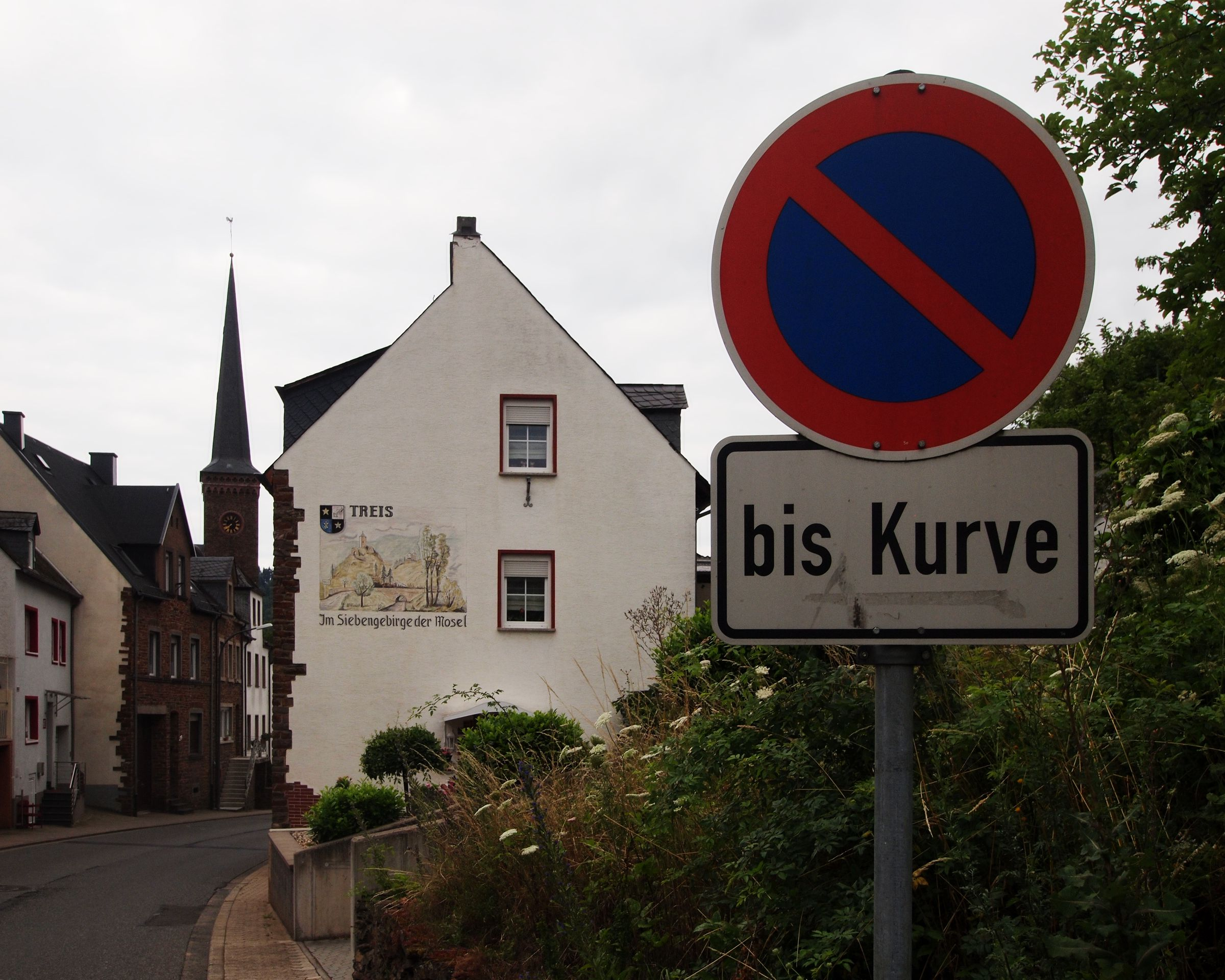 Treis, Ortseinfahrt von Lieg. Verkehrszeichen Halteverbot bis Kurve